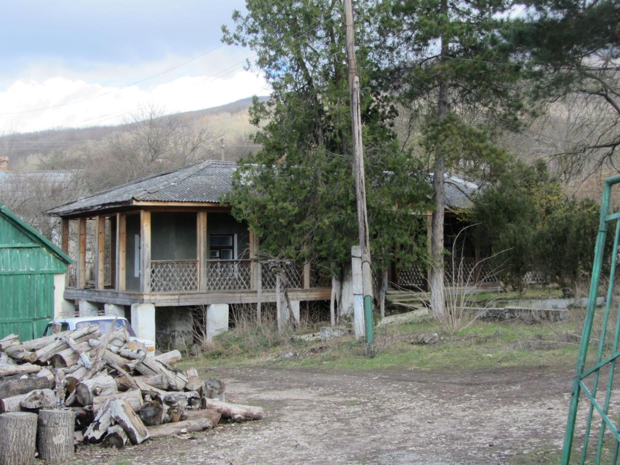 Усадьба князя Али-бей Булгакова (1883) Коккозы (Соколиное)